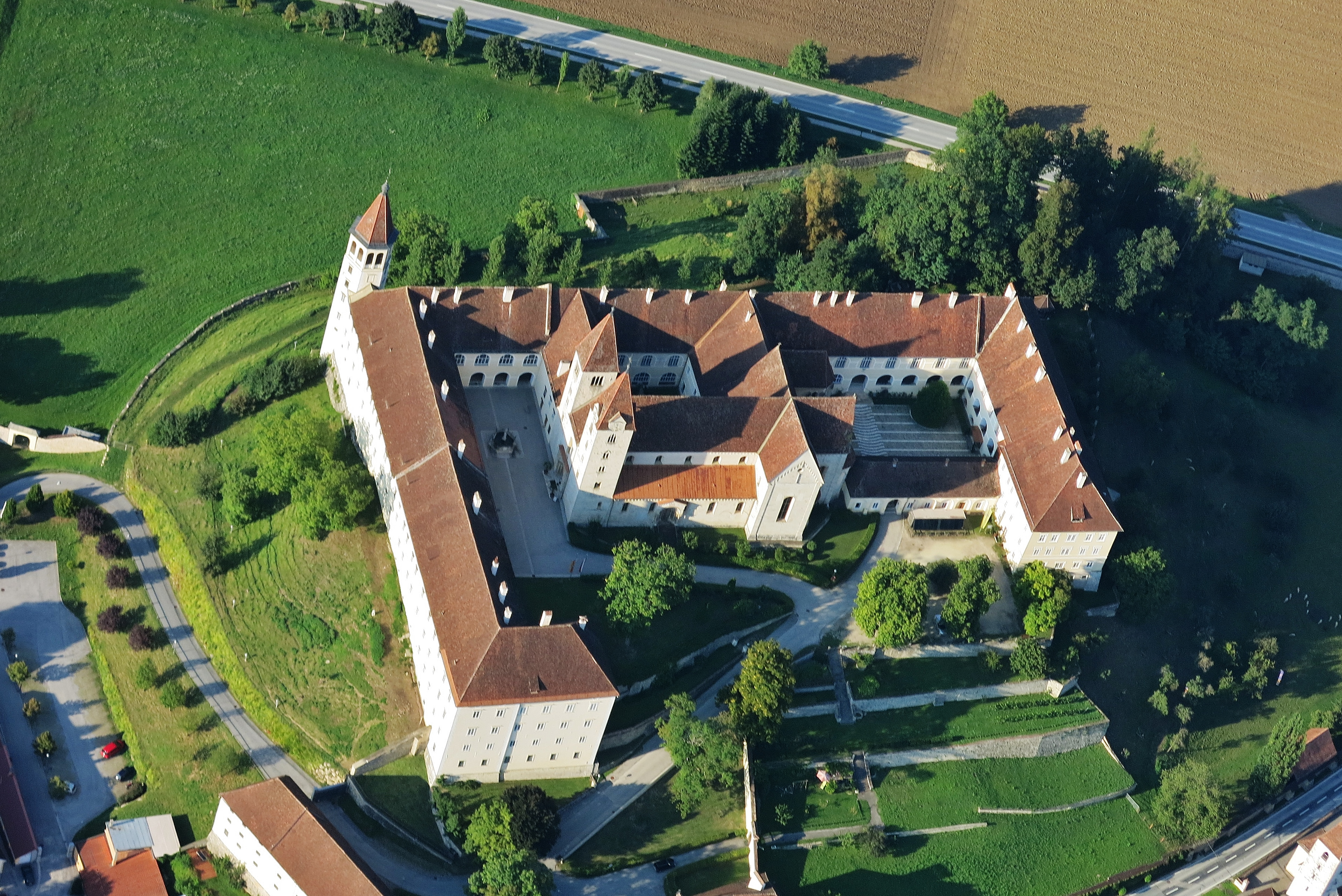 Gesamtanlage Benediktinerstift St. Paul im Lavanttal